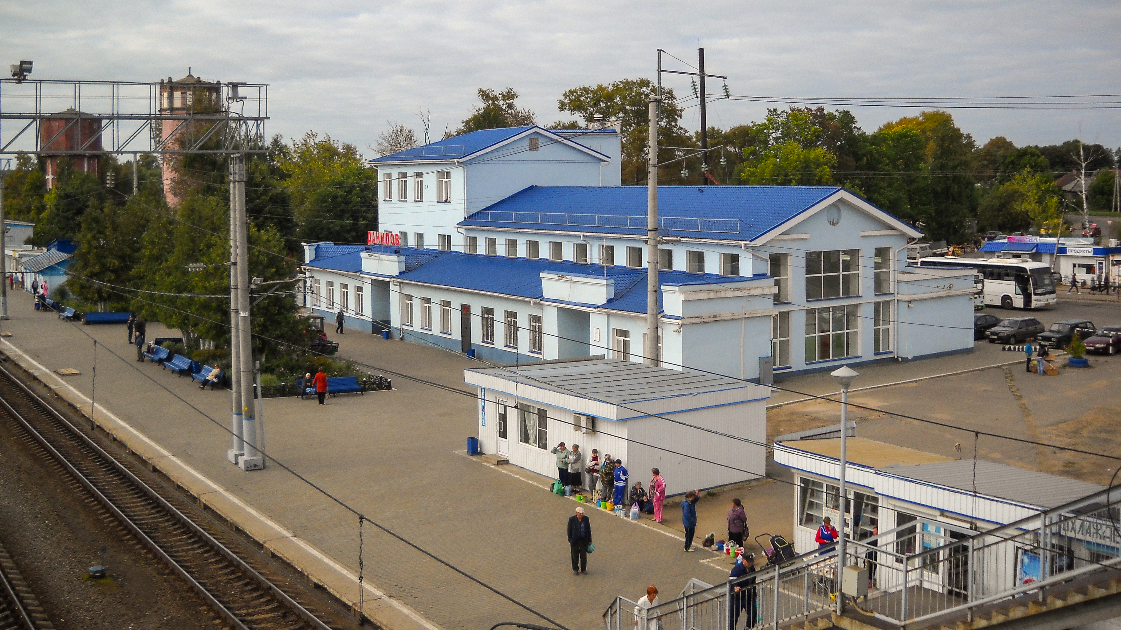 Станция Данилов